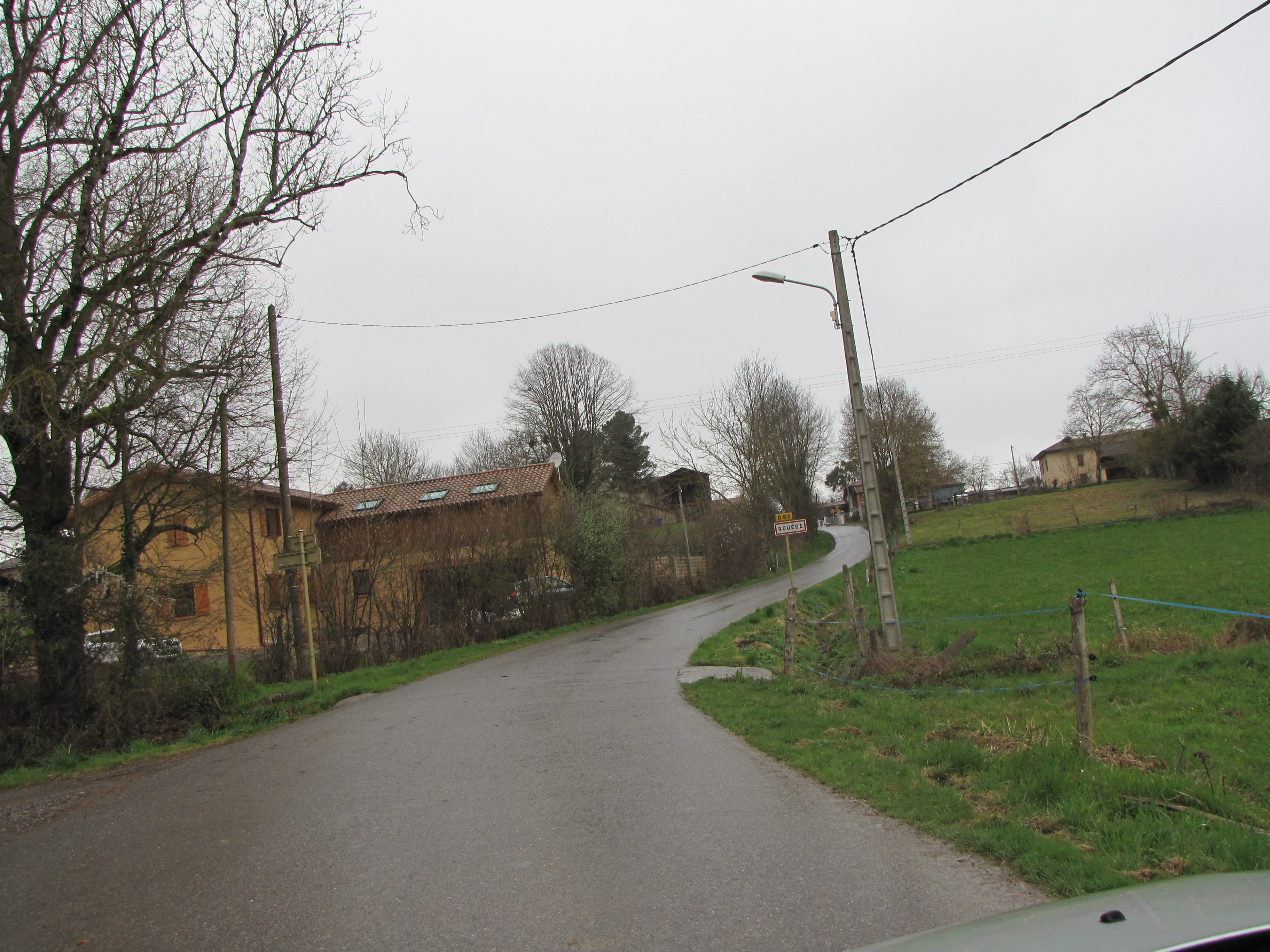 Rouède